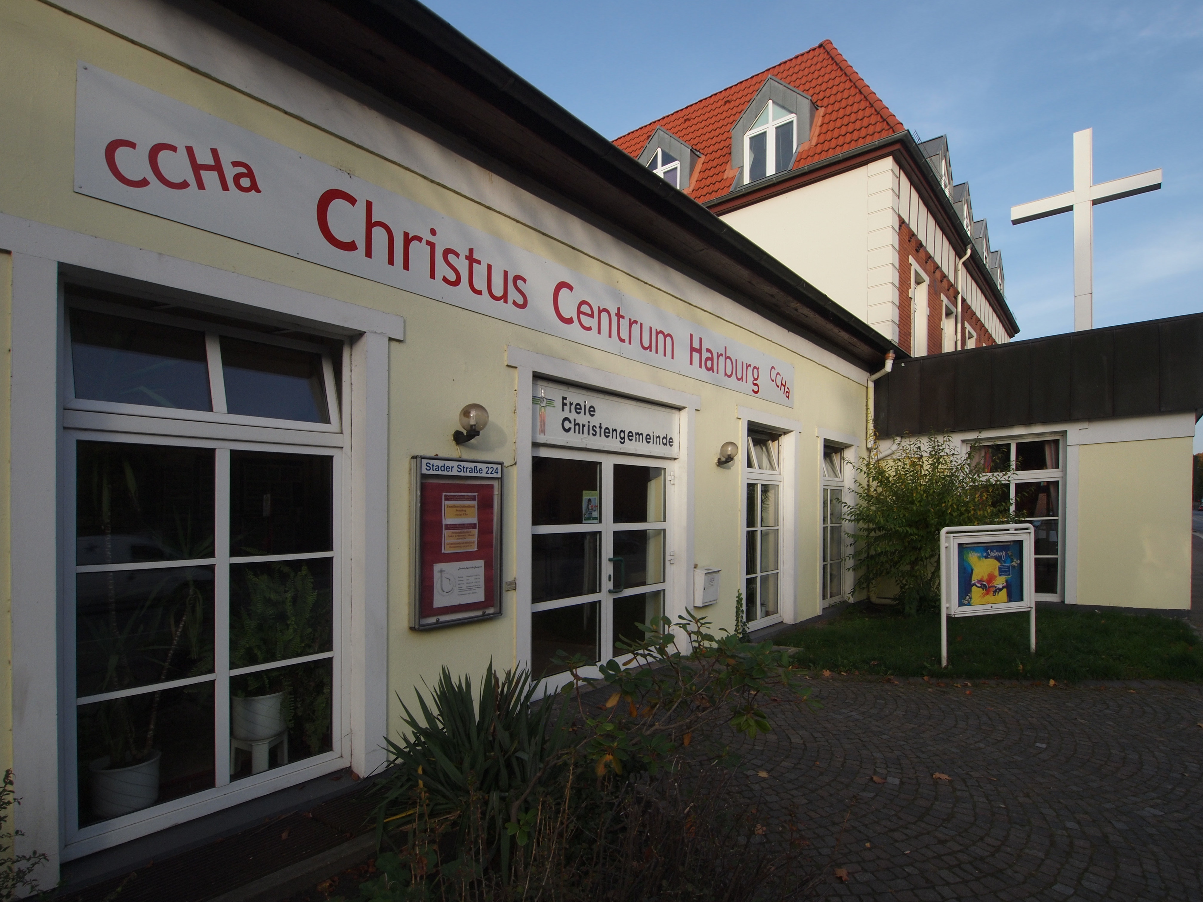 Christus Centrum Harburg, eine Freie Christengemeinde im Bund Freikirchlicher Pfingstgemeinden